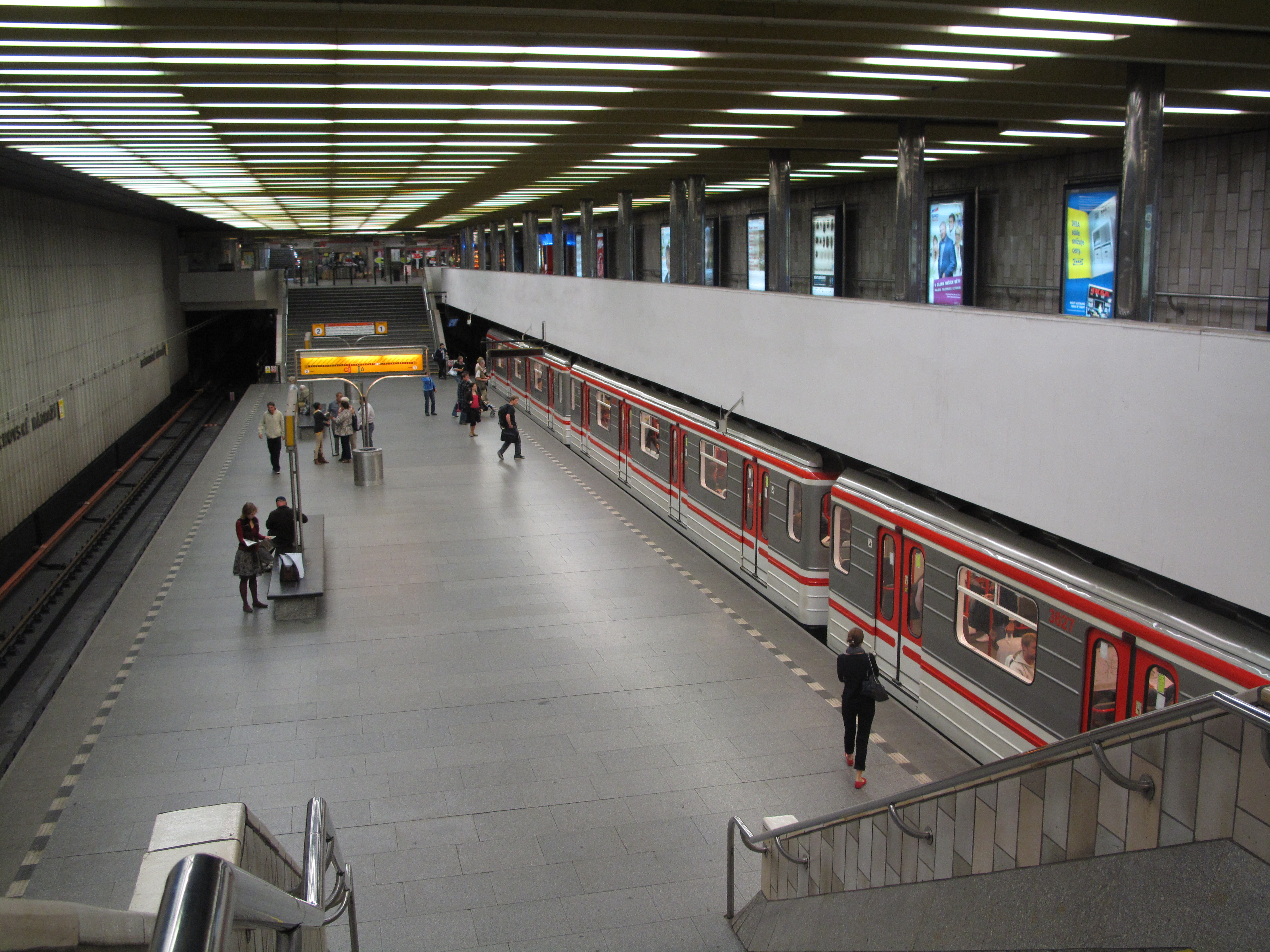 Metro ve stanici Smíchov